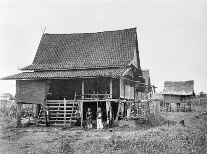 Foto. Deze foto is gemaakt tijdens de Sumatra Expeditie van 1877-1879. Landschappen en oudheden uit Djambi.. De woning van de Sultan van Djambi te Doesoen Tengah, Sumatra